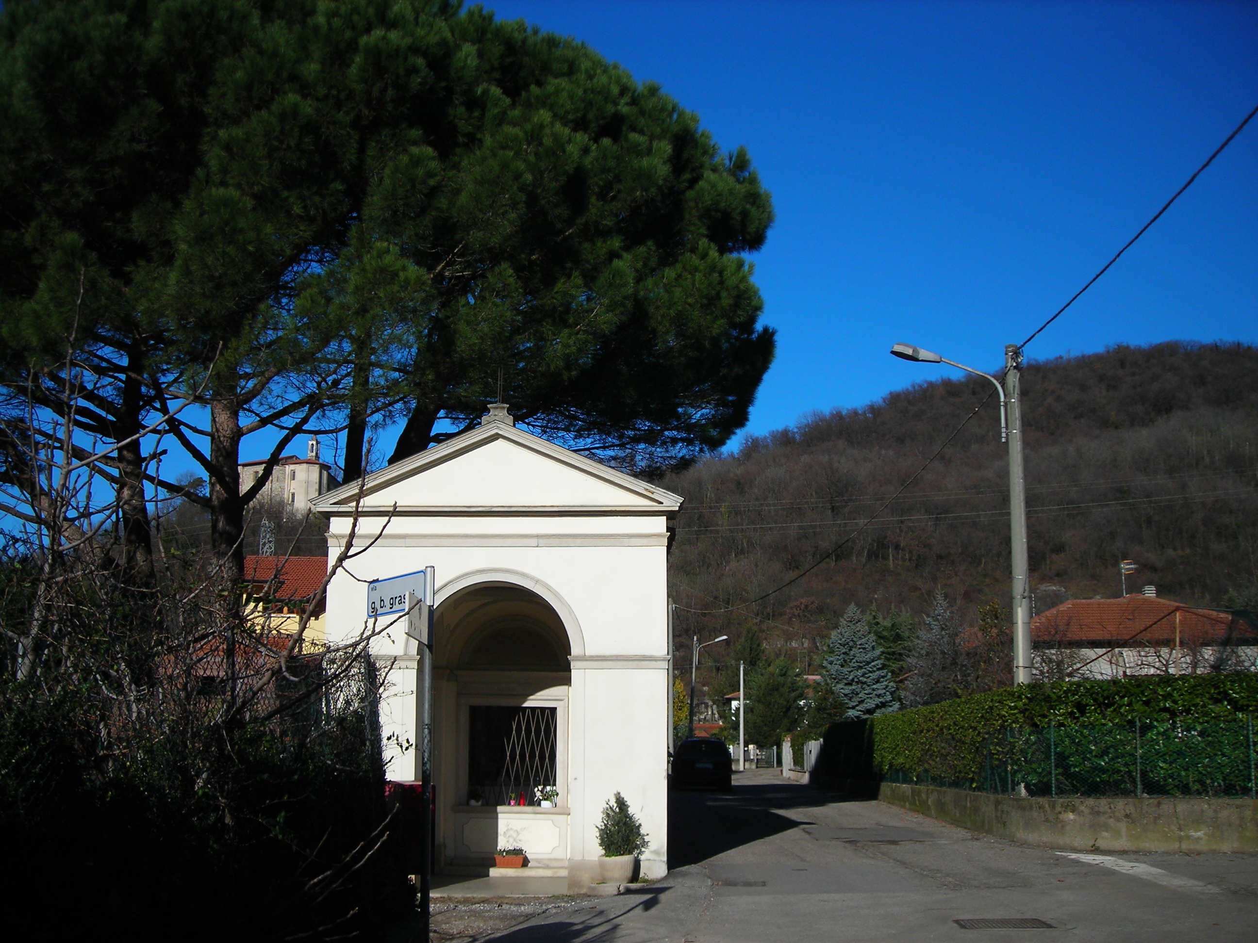 Cappelletta dedicata alla Madonna a Brenno Useria (Arcisate)